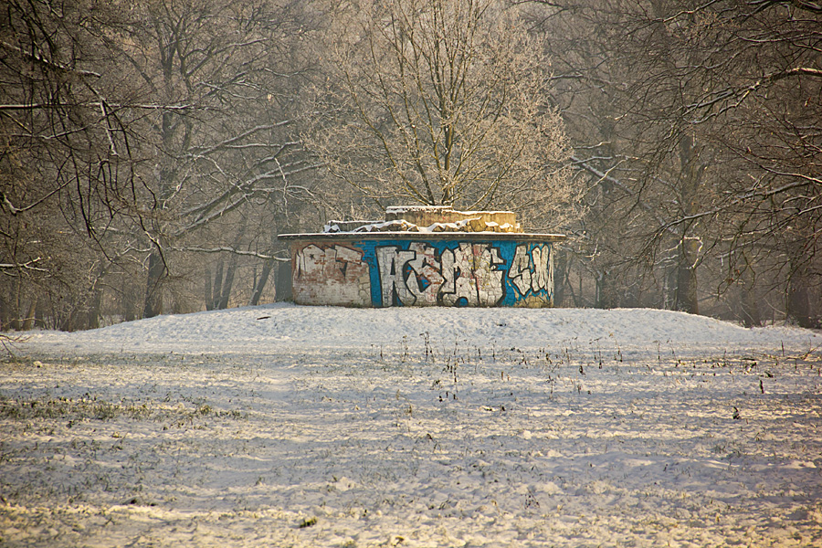 Dawny pomnik Oddziałów Szturmowych (SA) w Parku Wschodnim we Wrocławiu